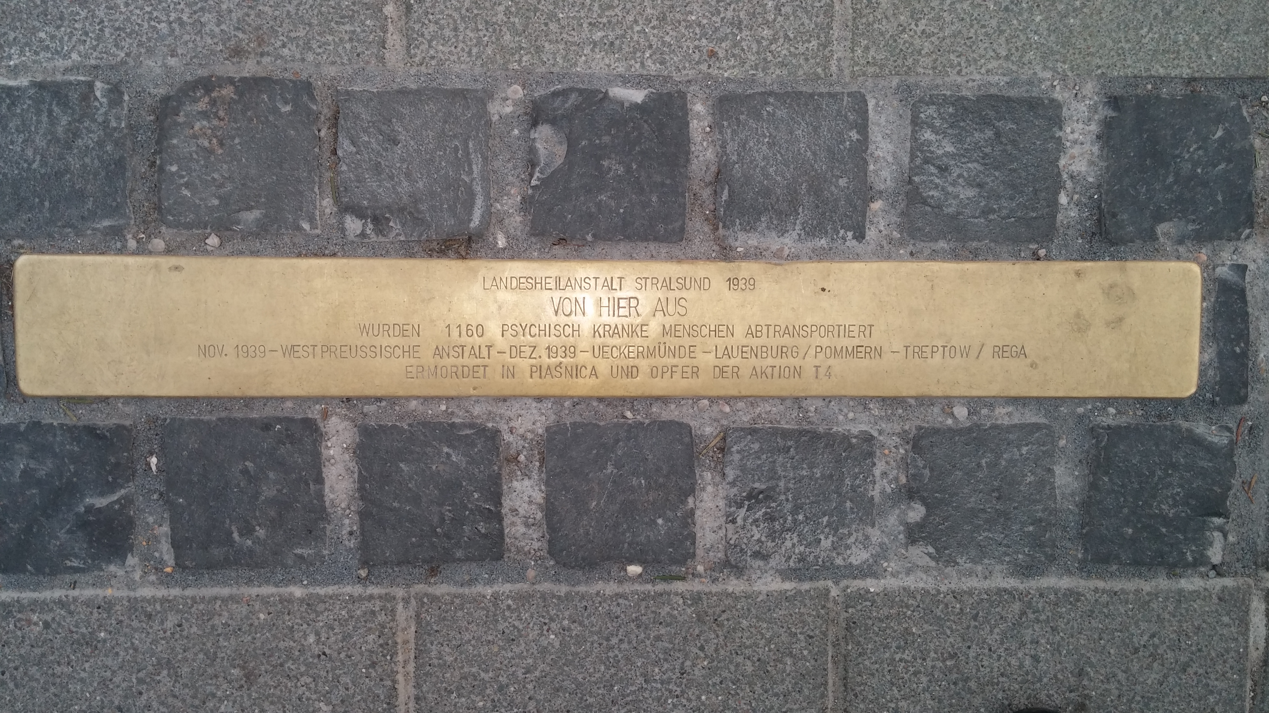 Stolperschwelle im Stralsunder Hauptbahnhof. Zur Erinnerung an den Abtransport von psychisch Kranken und an ihre Ermordung in der Zeit des deutschen Nationalsozialismus. Text: "LANDESHEILANSTALT STRALSUND 1939 VON HIER AUS WURDEN 1160 PSYCHISCH KRANKE MENSCHEN ABTRANSPORTIERT NOV. 1939 - WESTPREUSSISCHE ANSTALT - DEZ. 1939 - UECKERMüNDE - LAUENBURG/POMMERN - TREPTOW/REGA ERMORDET IN PLASNICA UND OPFER DER AKTION T42" Die "Stolperschwelle" wurde am 23. Oktober 2014 verlegt. Sie soll an die 1160 psychisch kranken Frauen und Männer, die im November und Dezember 1939 von dort aus in den Tod geschickt wurden, erinnern. Die Frauen und Männer waren Patienten in der Landesheilanstalt Stralsund auf dem Gelände des heutigen Krankenhauses West. Initiiert wurde das Projekt vom Chefarzt der Klinik für Psychiatrie und Psychotherapie, Harald Freyberger, und dem Leitenden Oberarzt Jan Ambruster. Unterstützt wurde das Projekt von der Deutschen Bahn und der Stadt Stralsund. Verlegt hat die Schwelle Gunter Demnig.